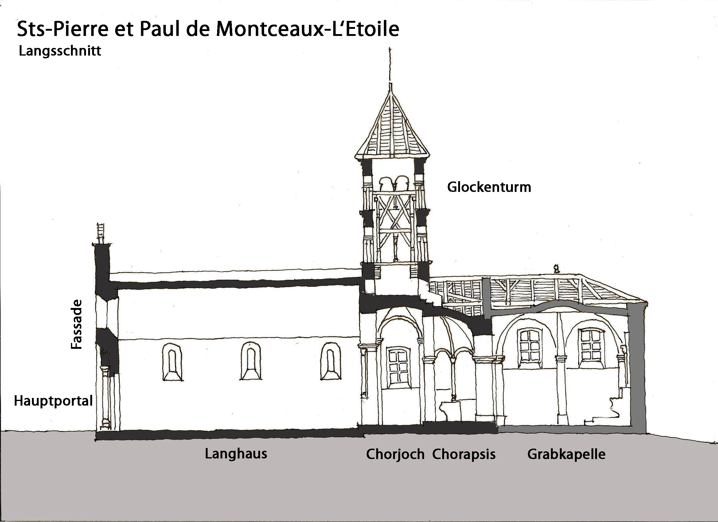 Montceaux-l'Étoile,Längsschnit, Handskizze